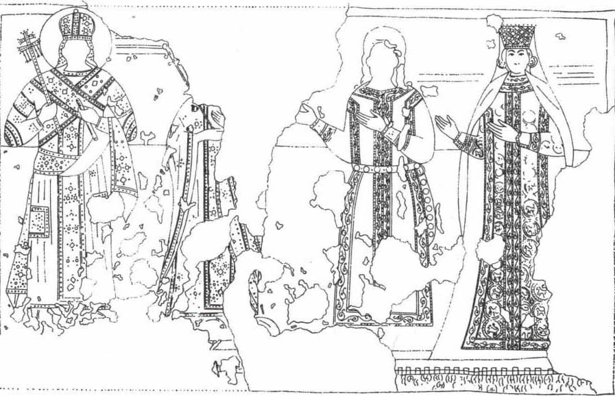 Војвода Дејан и војводица Владислава у друштву владарског пара, краља Стефана Душана и краљице Јелене, у манастиру Кучевиште (1332-1337).